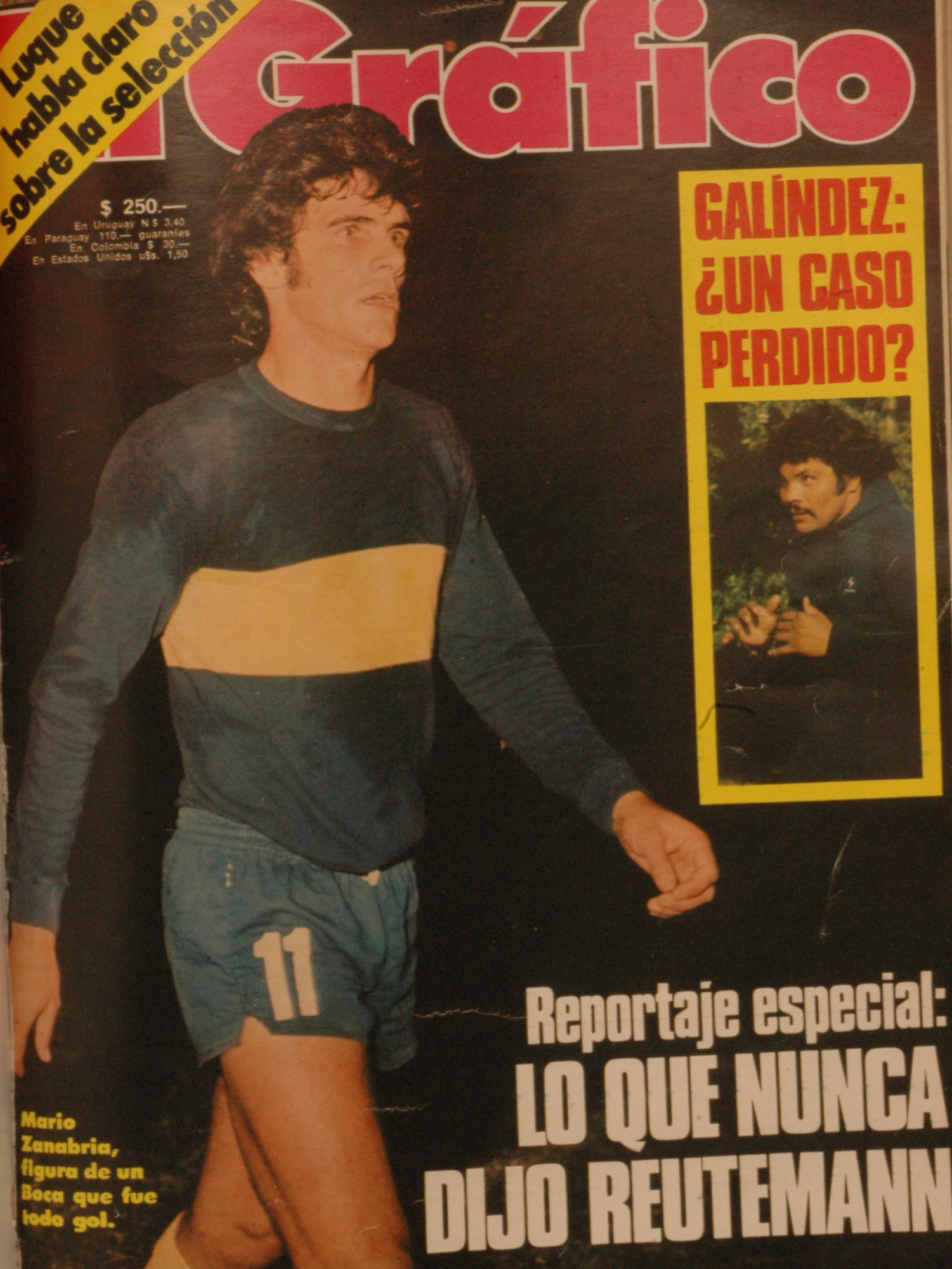 El Grafico del 12 de Abril de 1977. Edicion 3001